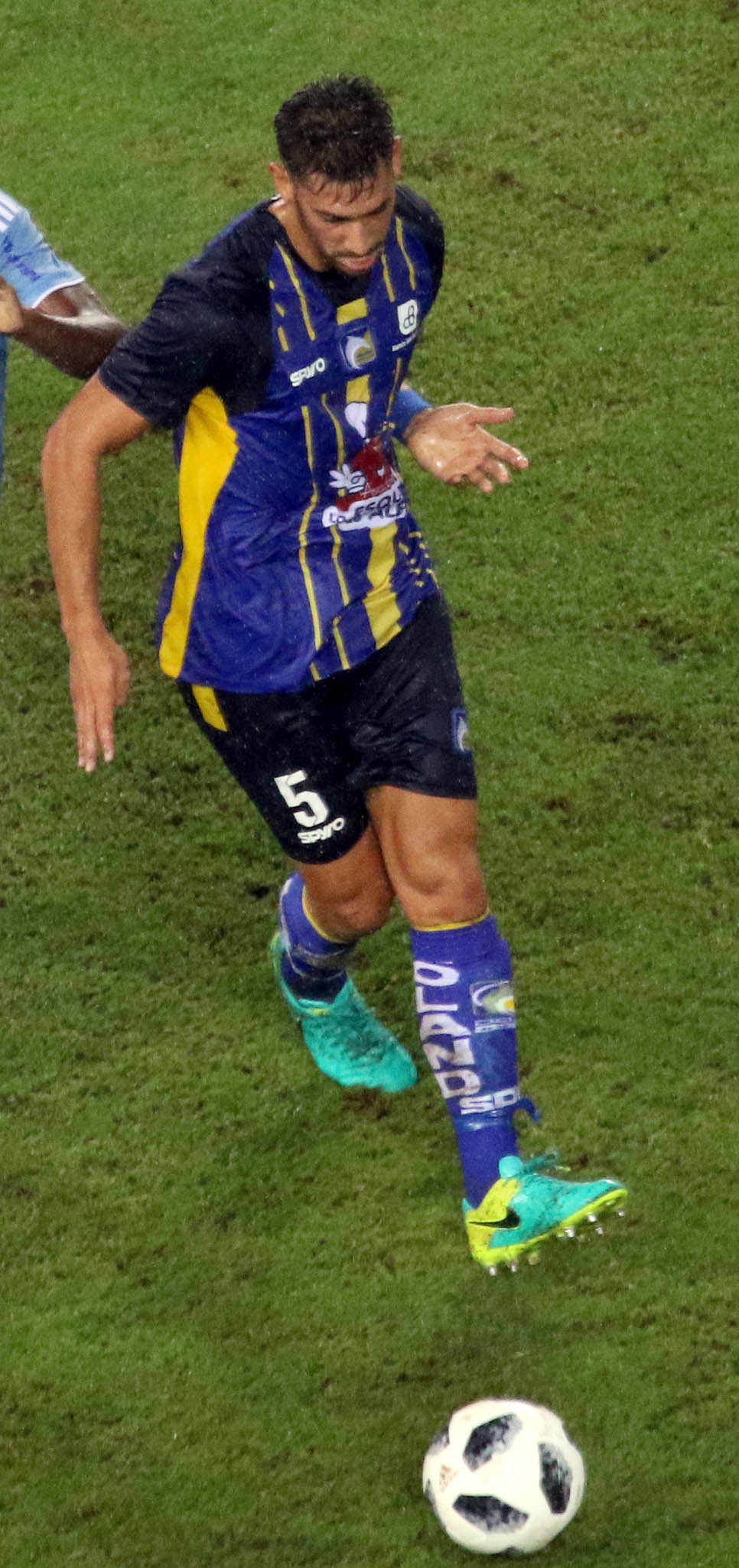 Guayaquil, viernes 02 de febrero de 2018 (Andes).-Emelec enfrenta a Delfin en disputa por el el primer lugar de la Copa del Pacífico que se juega en el estadio Capwell. Foto:Andes/César Muñoz